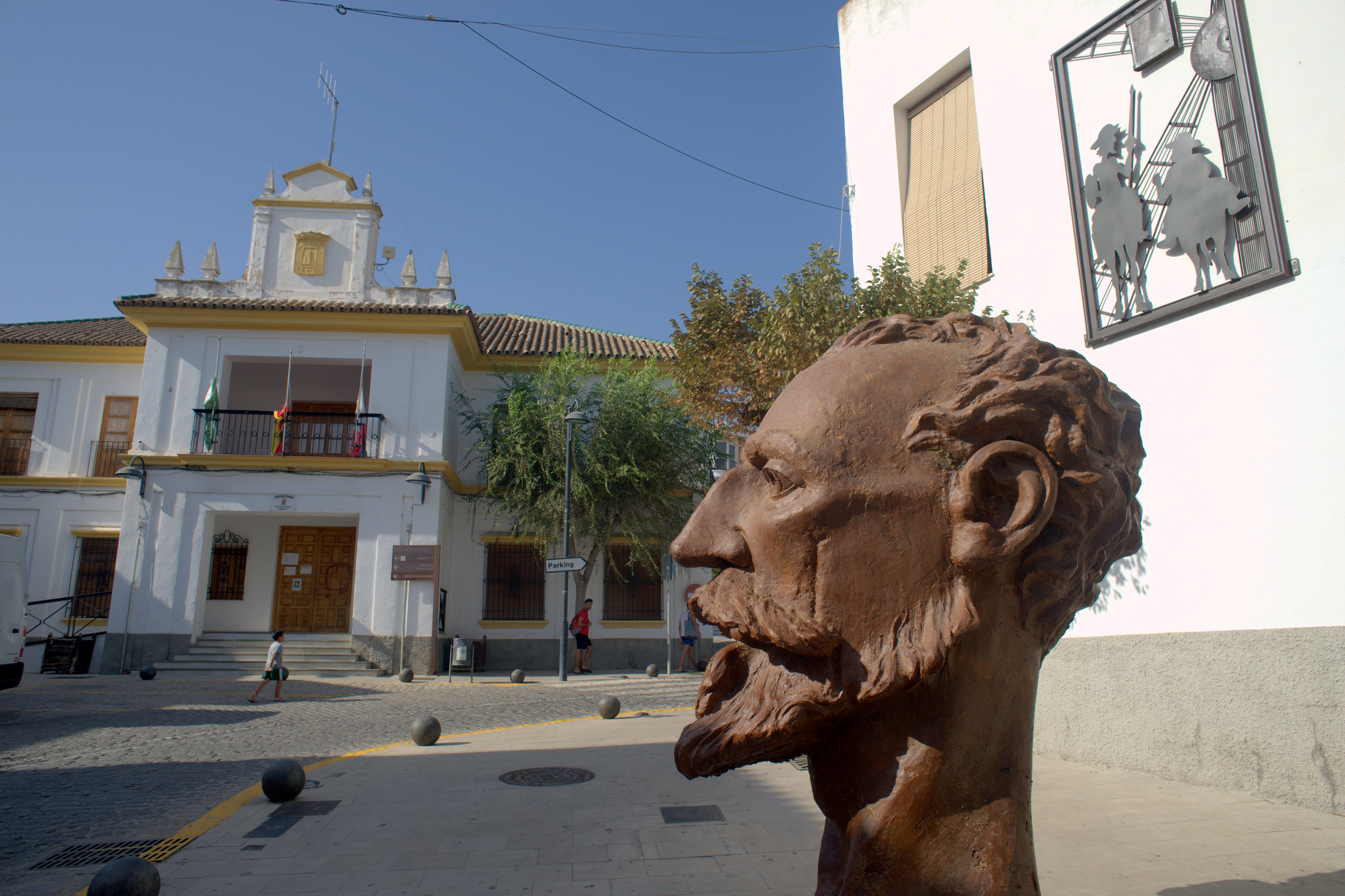 Busto del Quijote en la plaza frente al antiguo Ayuntamiento de Órgiva, homenaje a su biblioteca cervantina.